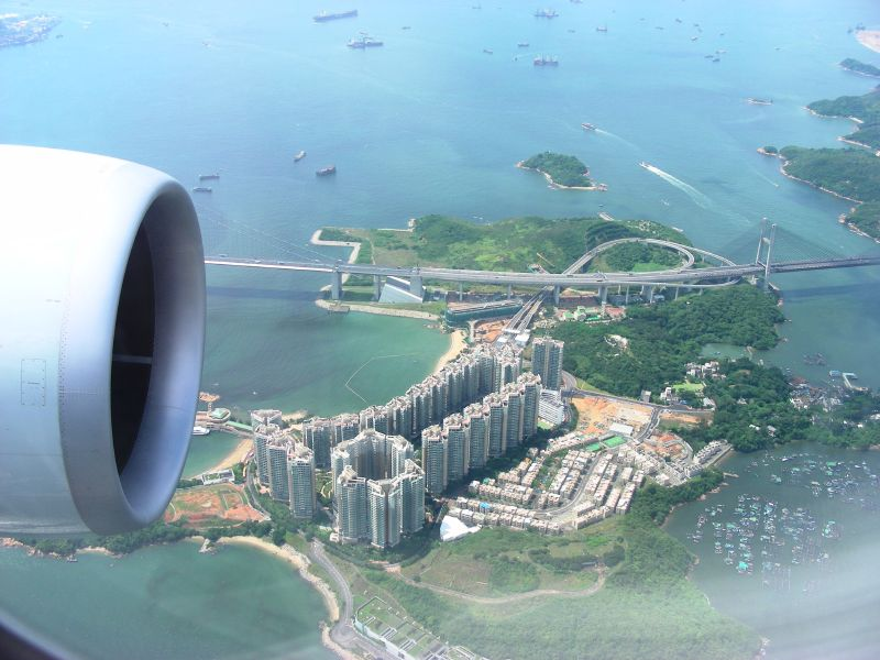 Ma Wan (馬灣)